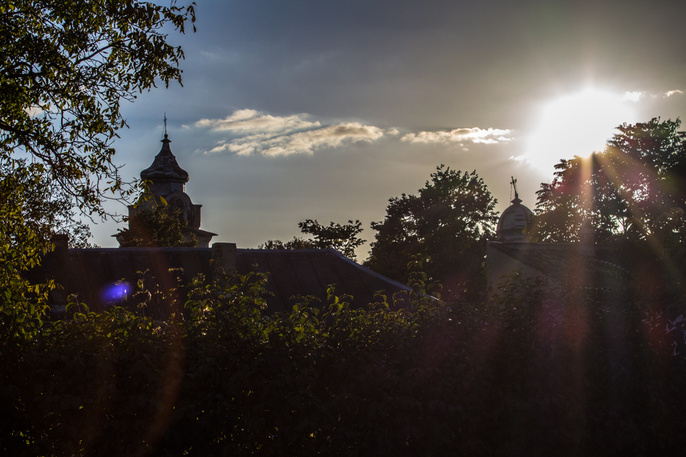 Siluetele turlelor bisericii, privite din partea de sud a orașului Botoșani 01